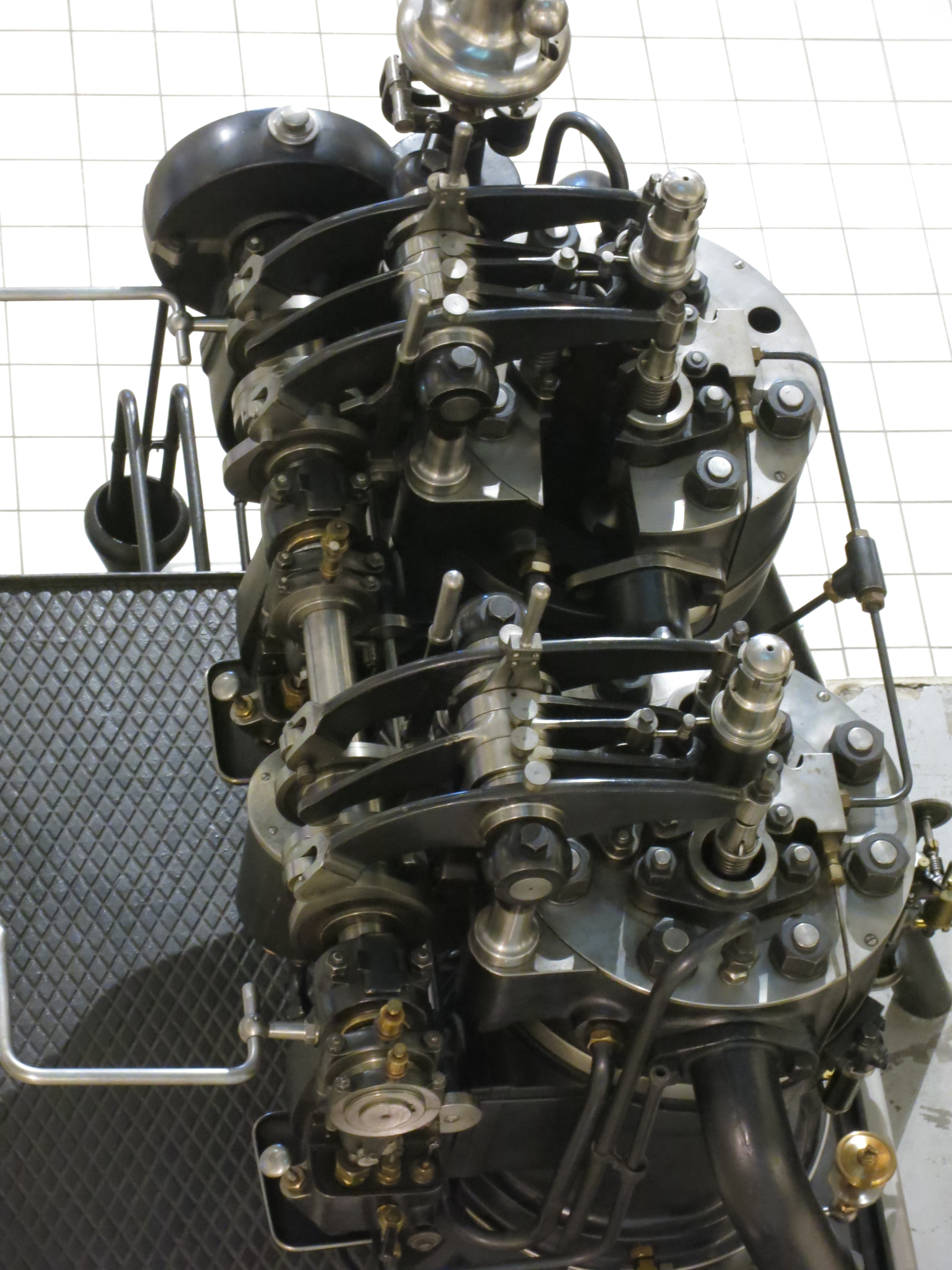 Zylinderköpfe von oben - Dieselmotor "Wärme-Motor Patent Diesel" der Grazer Waggon-&Maschinen-Fabriks-Aktiengesellschaft vorm. Joh.Weitzer GRAZ No 561 1915 Gut sichtbar: Die OHC-Ventilsteuerung mit neben den Zylinderköpfen liegender Nockenwelle mit Königswellenantrieb.